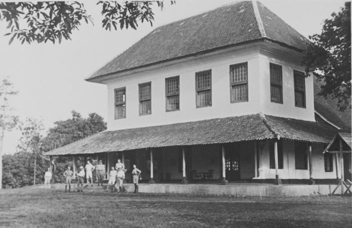 foto. Reserve-officieren van het KNIL tijdens een trainingsmars, voor het landhuis Pondok Gedeh ten zuidoosten van Meester Cornelis